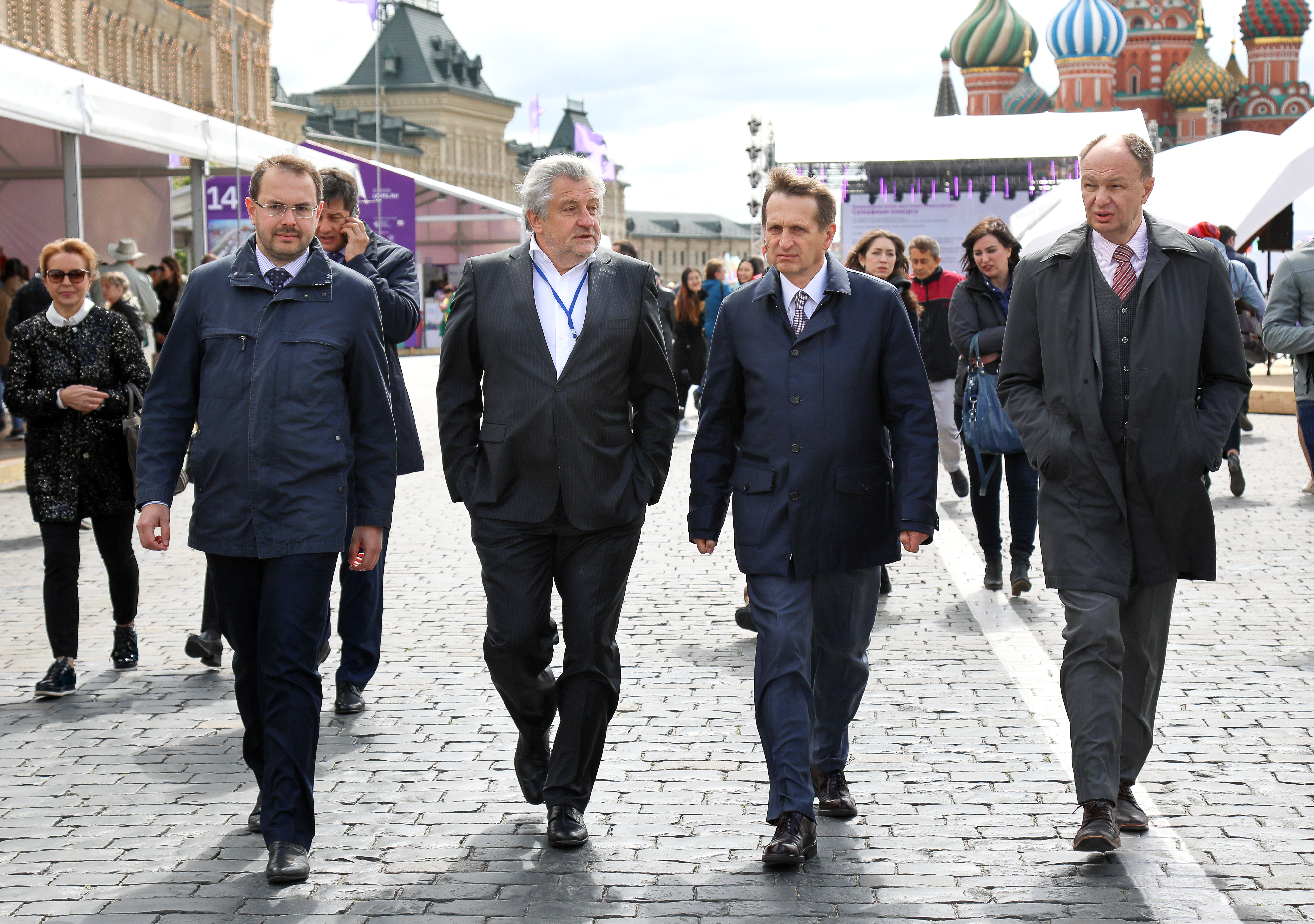 Слева направо: Константин Могилевский, Владимир Григорьев, Сергей Нарышкин, Михаил Сеславинский на книжном фестивале "Красная площадь"-2018.